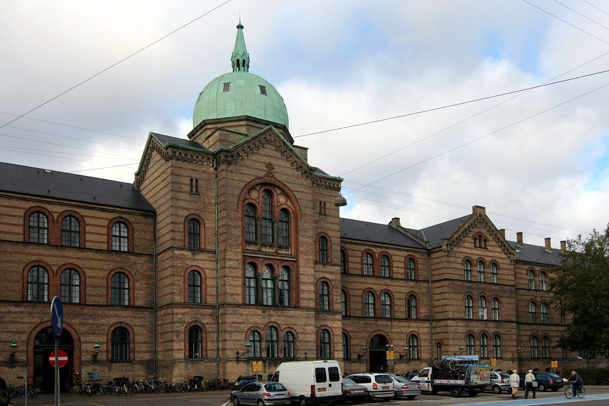 Kommunehospitalet, København. Bygget 1859-1863. Arkitekt: Christian Hansen. Fredet.